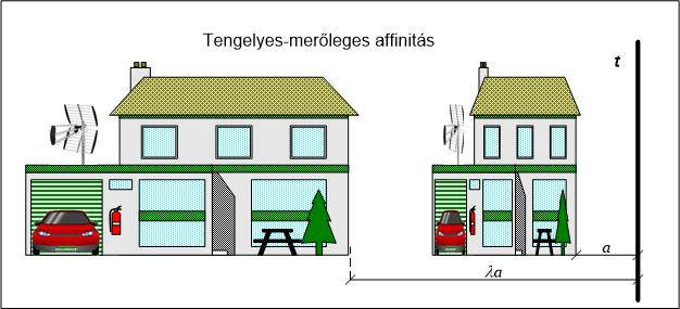 Geometriai transzformáció 2D-ben: tengelyes-merőleges affinitás